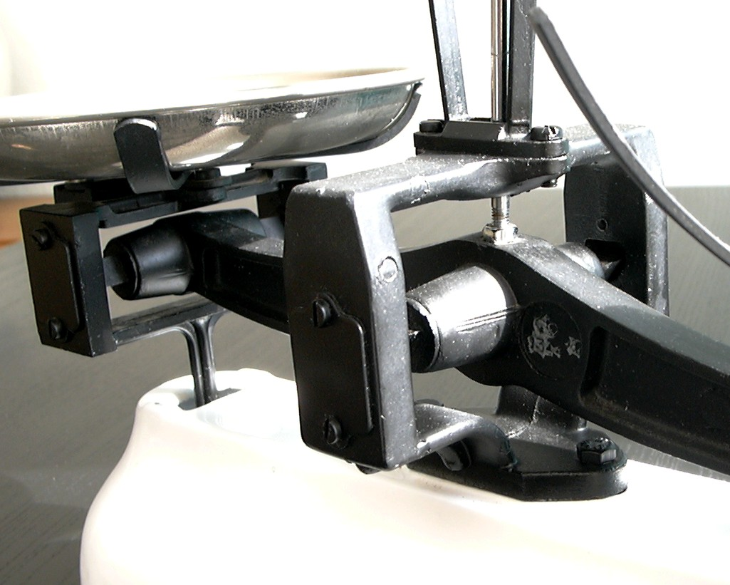 Roberval Balance, detail